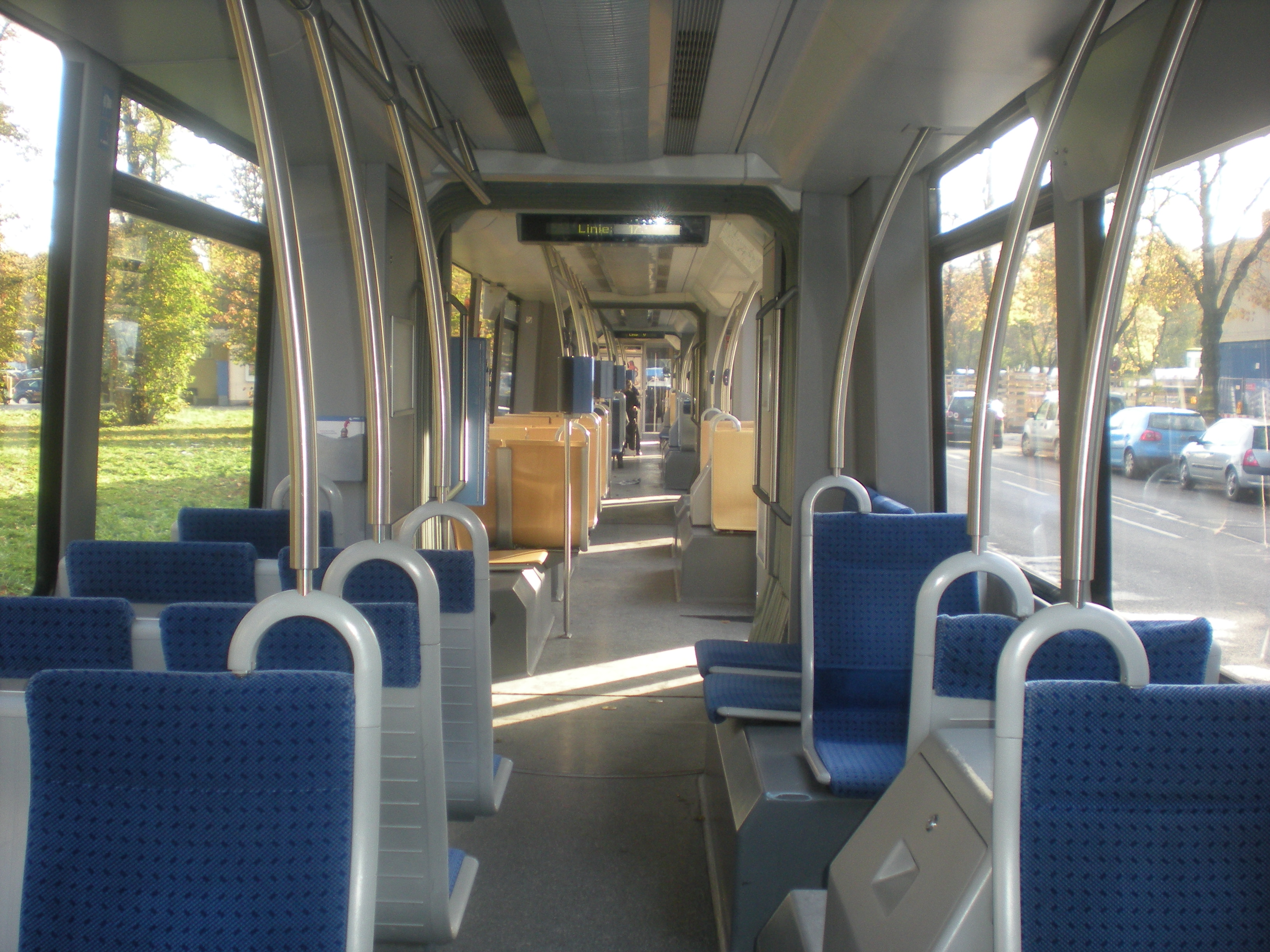 Innenraum eines Fahrzeugs der Baureihe R 3.3 der Straßenbahn München (Linie 17, Schwanseestraße)